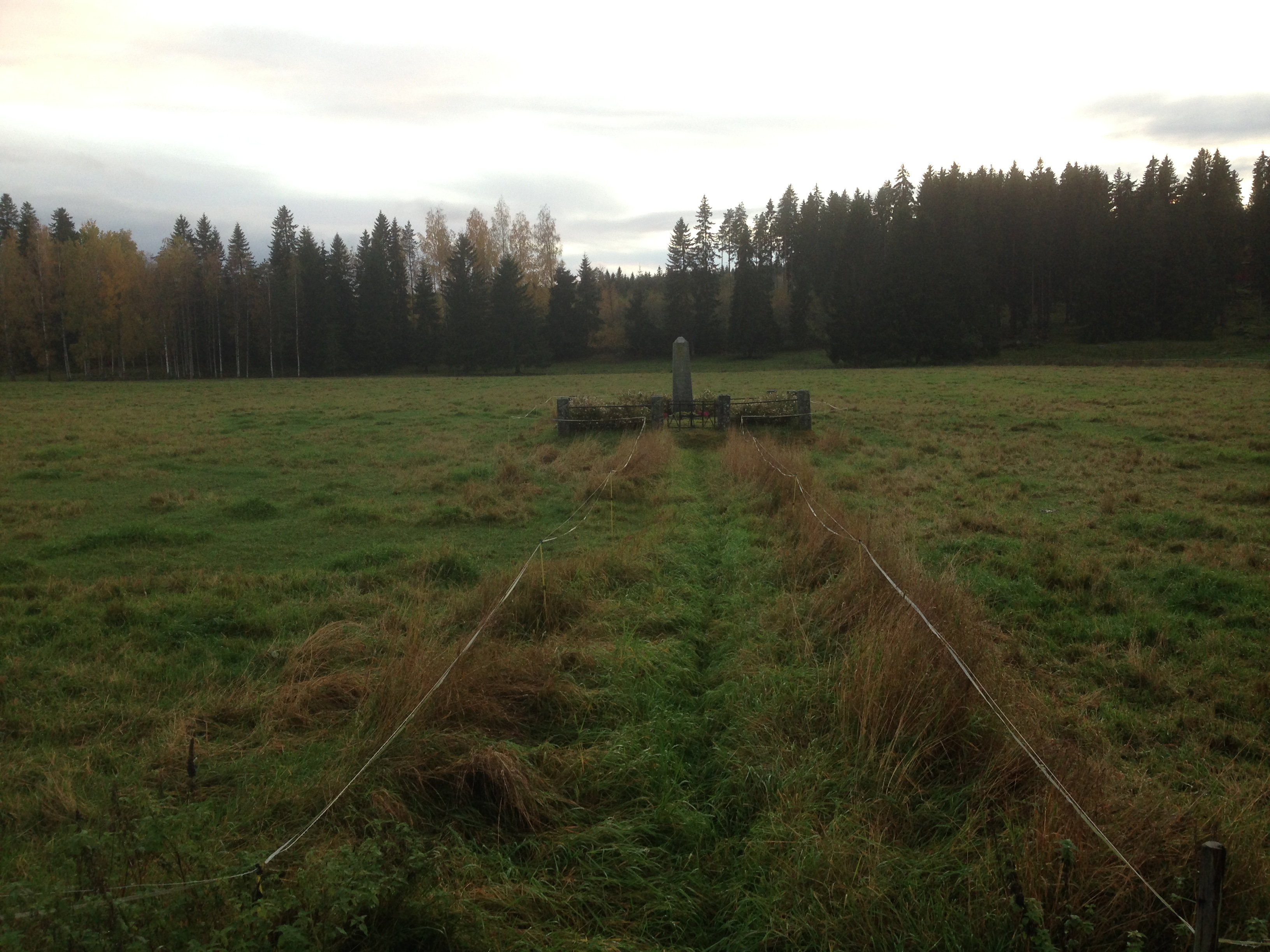 Yleisnäkymä muistomerkistä viereiseltä tieltä